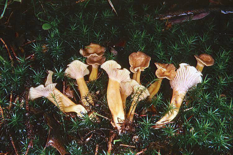 Trompetenpfifferlinge, Oberpfalz 2004 Foto: Michael Arnold